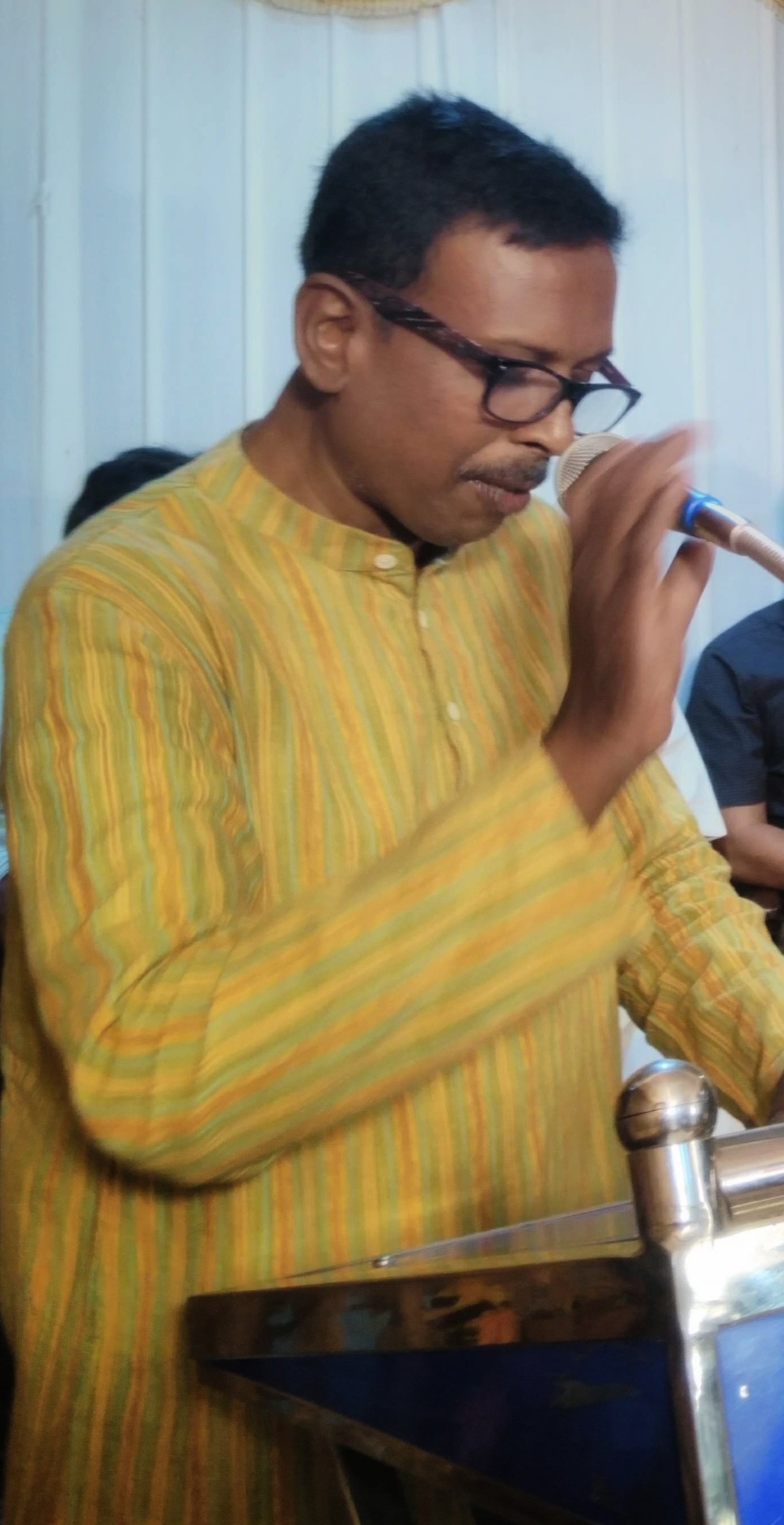 பேராசிரியர் முனைவர் இரா. பாவேந்தன் ஒரு தமிழியல் ஆய்வாளர், எழுத்தாளர்.